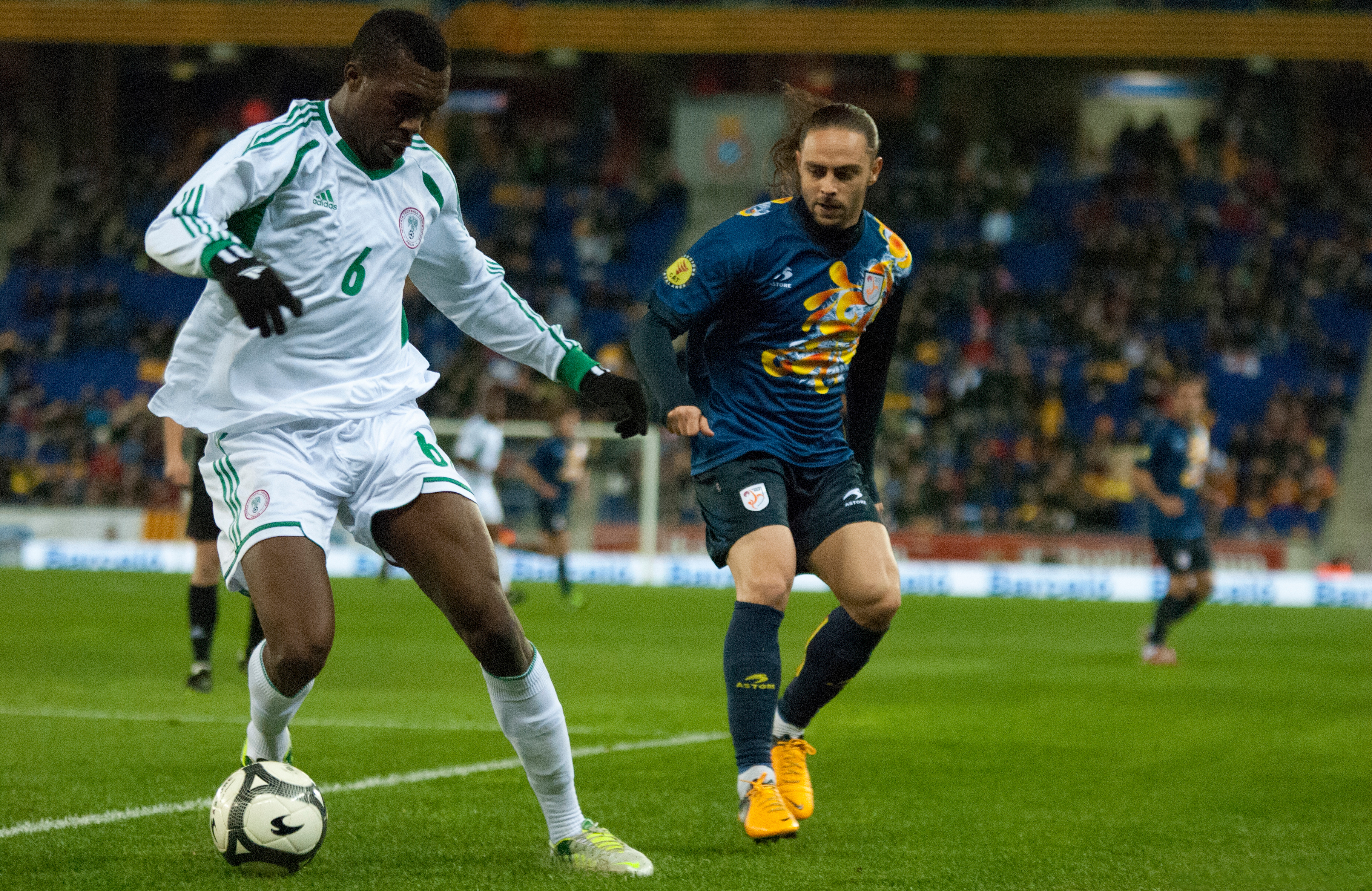 Sergio Garcia, en un partit de la selecció.